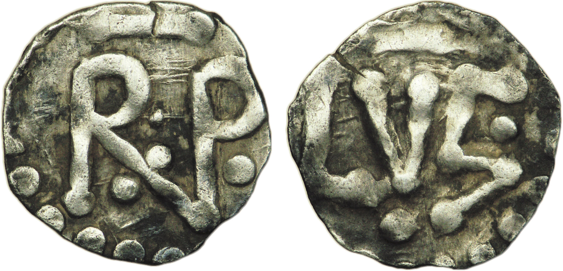 Nom de l'atelier : Lyon Métal : argent Diamètre : 14,5mm Axe des coins : 1h. Poids : 1,29g. Titulature avers : RP. Description avers : dans le champ sous une barre abréviative et cantonné de trois globules. Traduction avers : (Pépin roi). Titulature revers : LVG. Description revers : dans le champ sous un barre abréviative et cantonné de deux globules. Traduction revers : (Lyon).